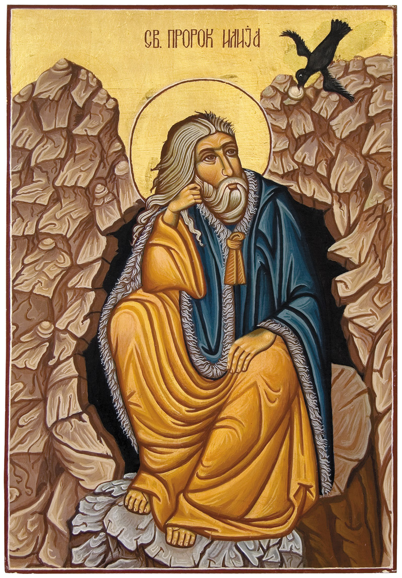 Mati Nina - Sveti prorok Ilija (Umetnička zbirka likovnih radova „Zavičajci“ Narodne biblioteke Jefimija Trstenik)